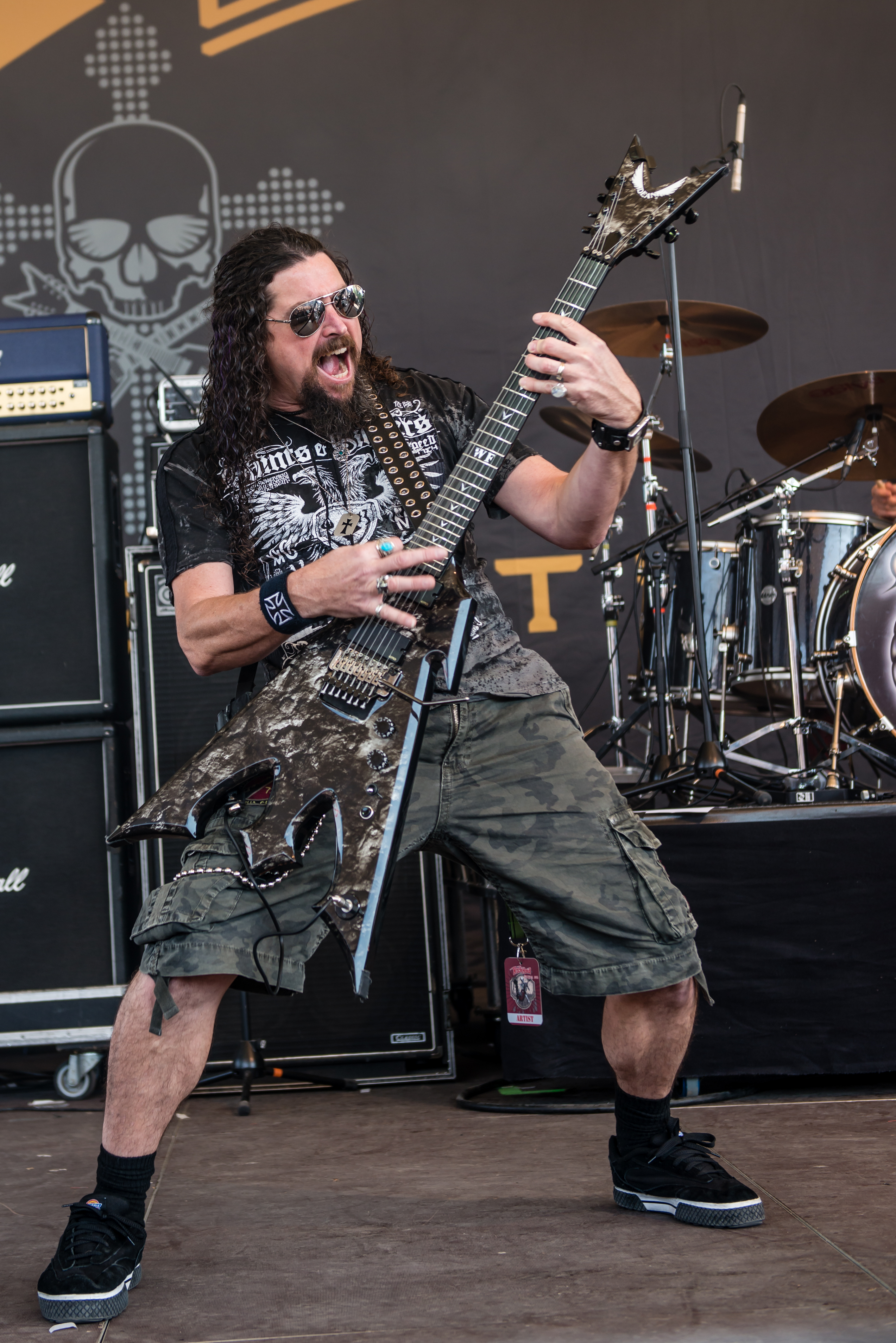 'Rock Hard Festival 2015; Gelsenkirchen Amphitheater': ' Michael Schenker's Temple of Rock'